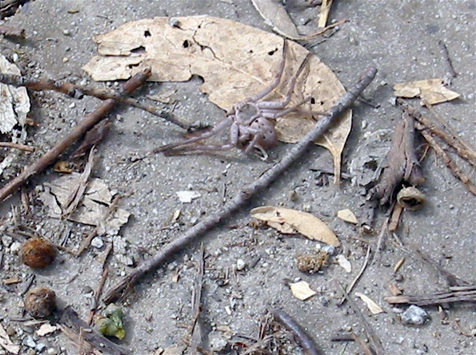 harmlos, aber erschreckt durch Größe und Schnelligkeit